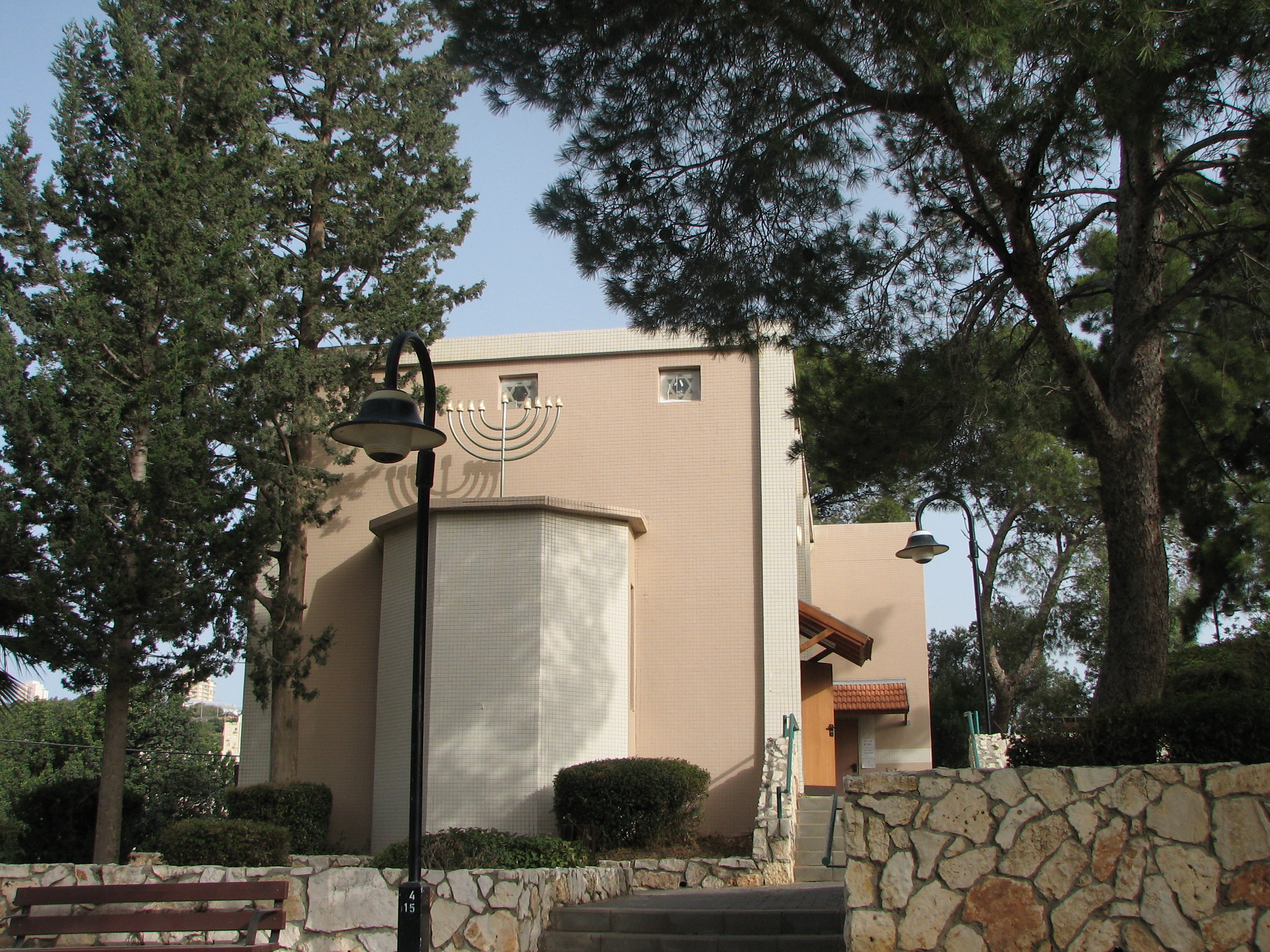 Nesher Givat Nesher - neighborhood in the city Nesher בשכונת גבעת נשר בעיר נשר. השכונה נוסדה בשנת 1949 Synagogue בית הכנסת בגבעת נשר הוקם בשנותותיה הראשונות של השכונה. ספר תורה הוכנס ב-1953